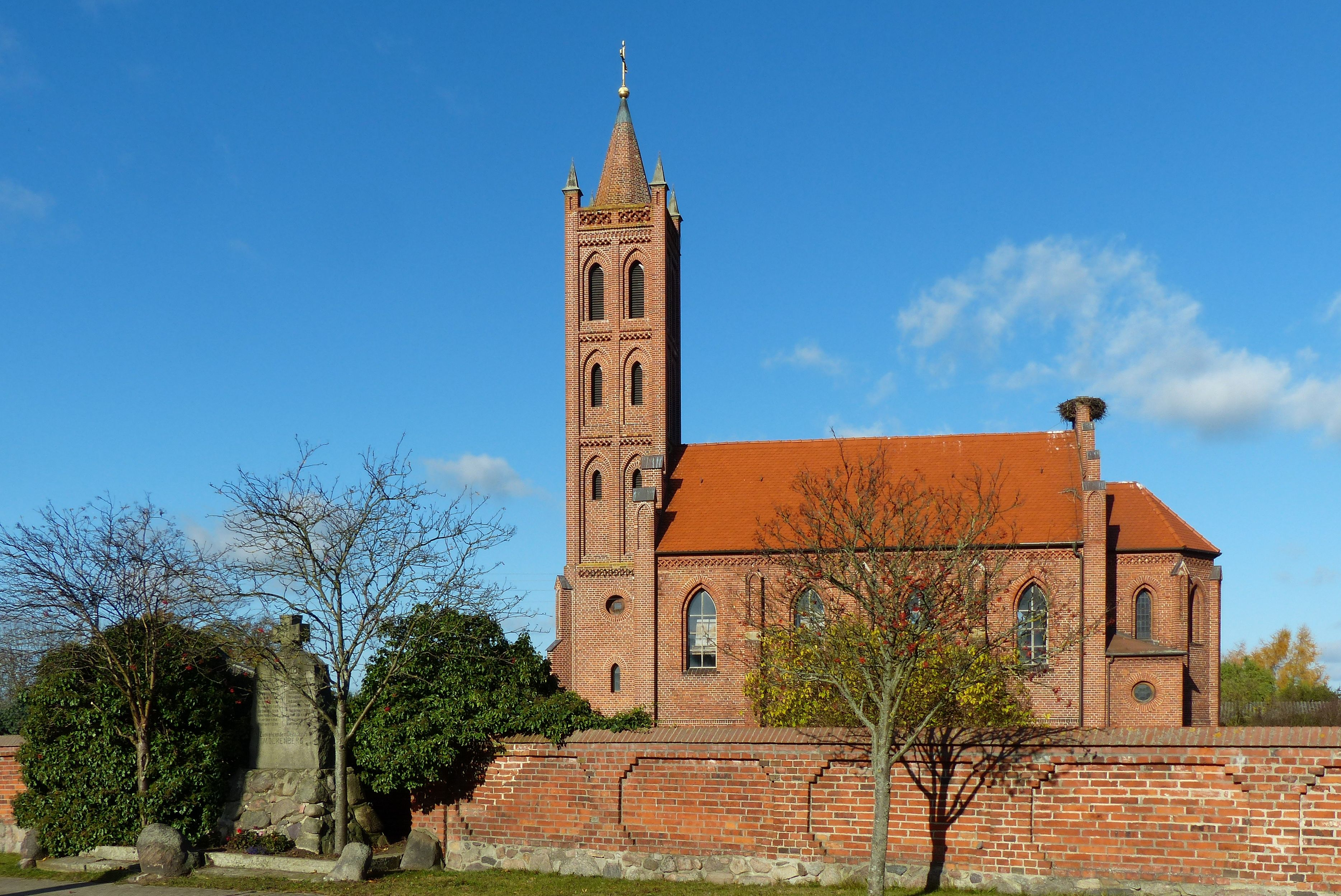 An höchst gelegener Stelle des Dorfes steht die Kirche. Sie entstand 1844/45, nachdem 1840 ein Brand das ganze Dorf eingeäschert hatte. Auf dem Giebel des Langhauses befindet sich seit langer Zeit ein fast alljährlich besetzter Storchenhorst.